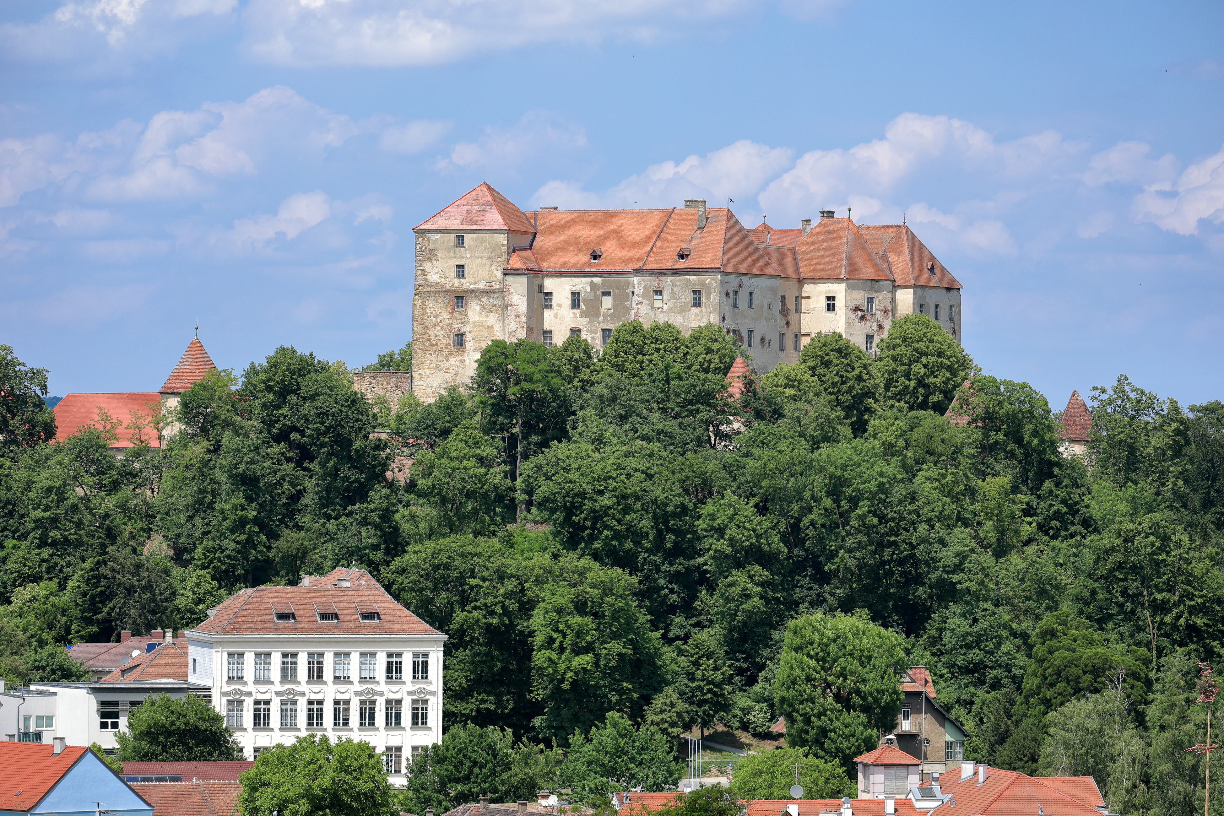 Südansicht des Schlosses Neulengbach (auch als Burg bezeichnet) in der niederösterreichischen Stadtgemeinde Neulengbach.Ursprünglich Ende des 12. Jahrhunderts durch die Herren von Lengenbach als Höhenburg auf einem freistehenden und rd. 80 m hohem Bergkegel über der Siedlung errichtet. Um 1500 wurde die rund 540 m lange und mit acht Türmen verstärkte äußeren Wehrmauer errichtet. Im 3. Drittel des 16. Jahrhunderts und in der 1. Hälfte des 17. Jahrhunderts erfolgte der Ausbau bzw. die Erweiterung der Burg zu einem schmucklosen Spätrenaissanceschloss.